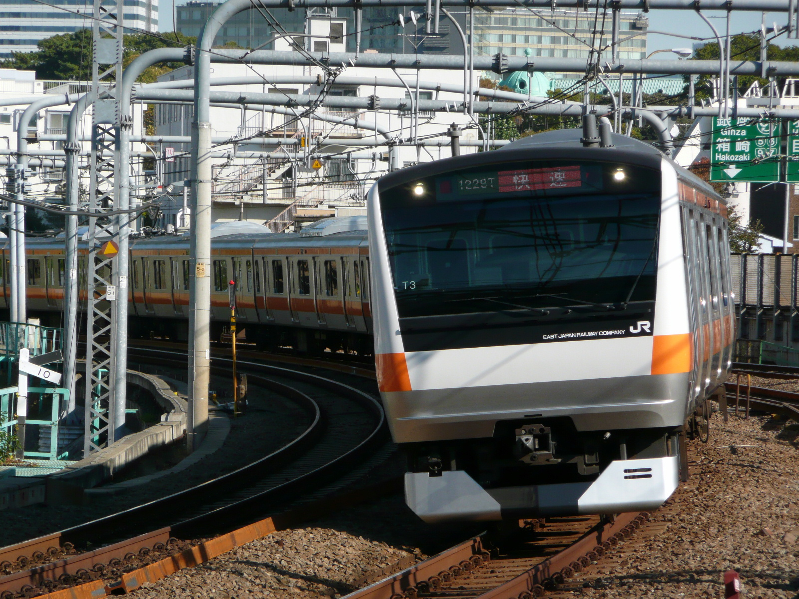 JR東日本E233系電車(0番台)。四ッ谷－新宿間(信濃町駅)にて撮影。